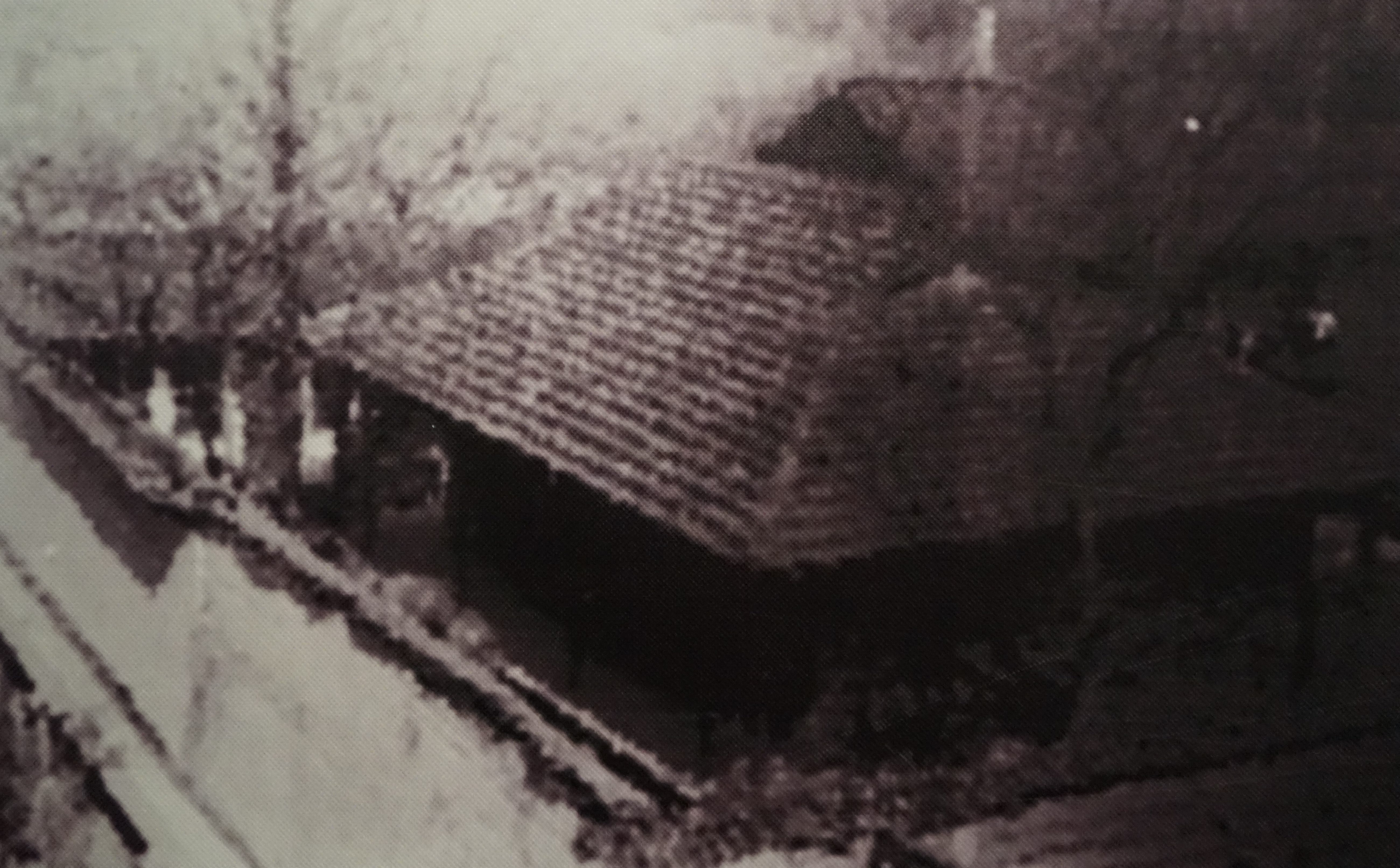 郁达夫故居（风雨茅庐）旧影。位于大学路场官弄63号。1928年2月郁达夫与王映霞在西湖畔成婚。